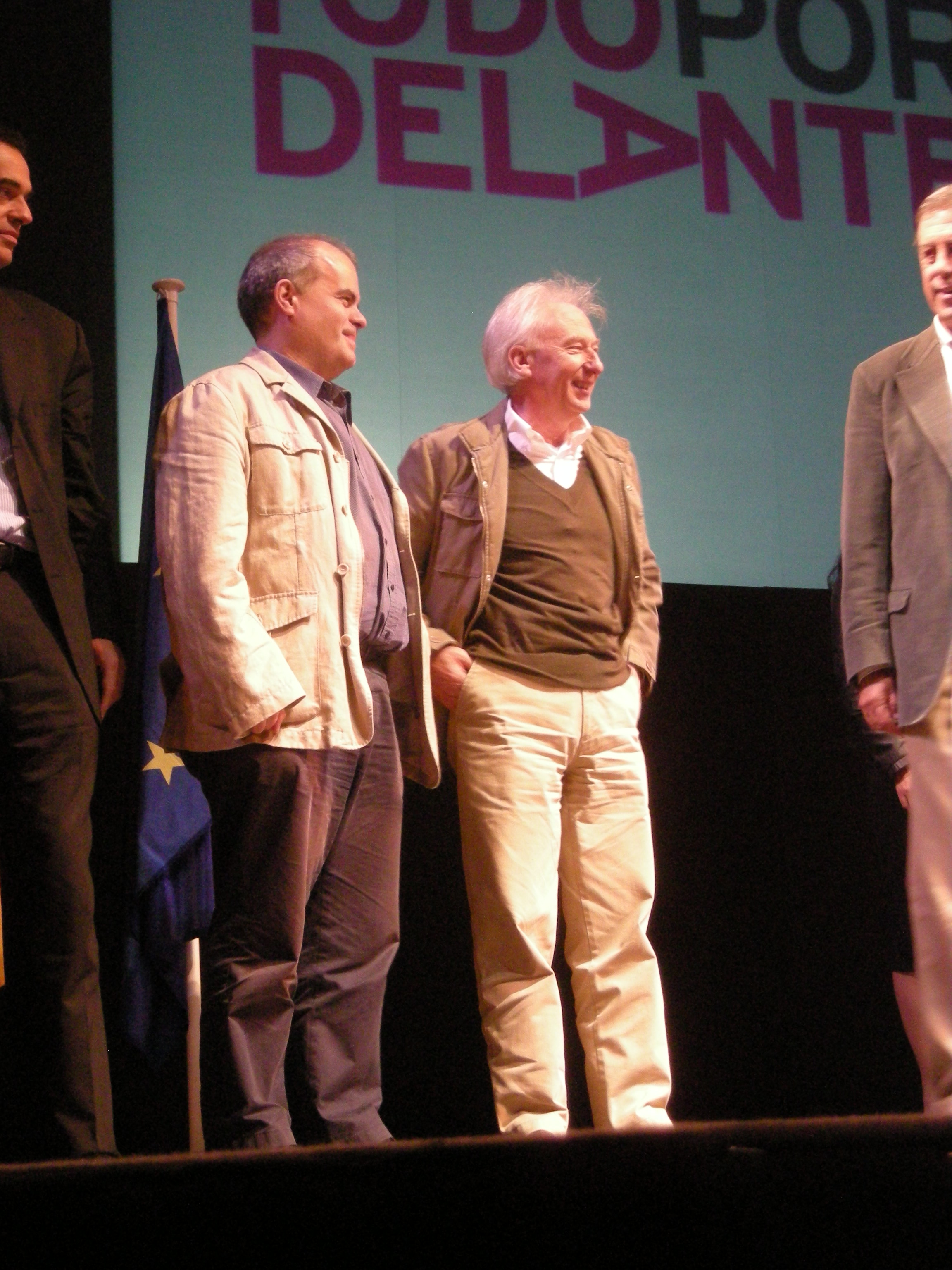 Carlos Martínez Gorriarán y Albert Boadella en el acto de I Aniversario de UPyD